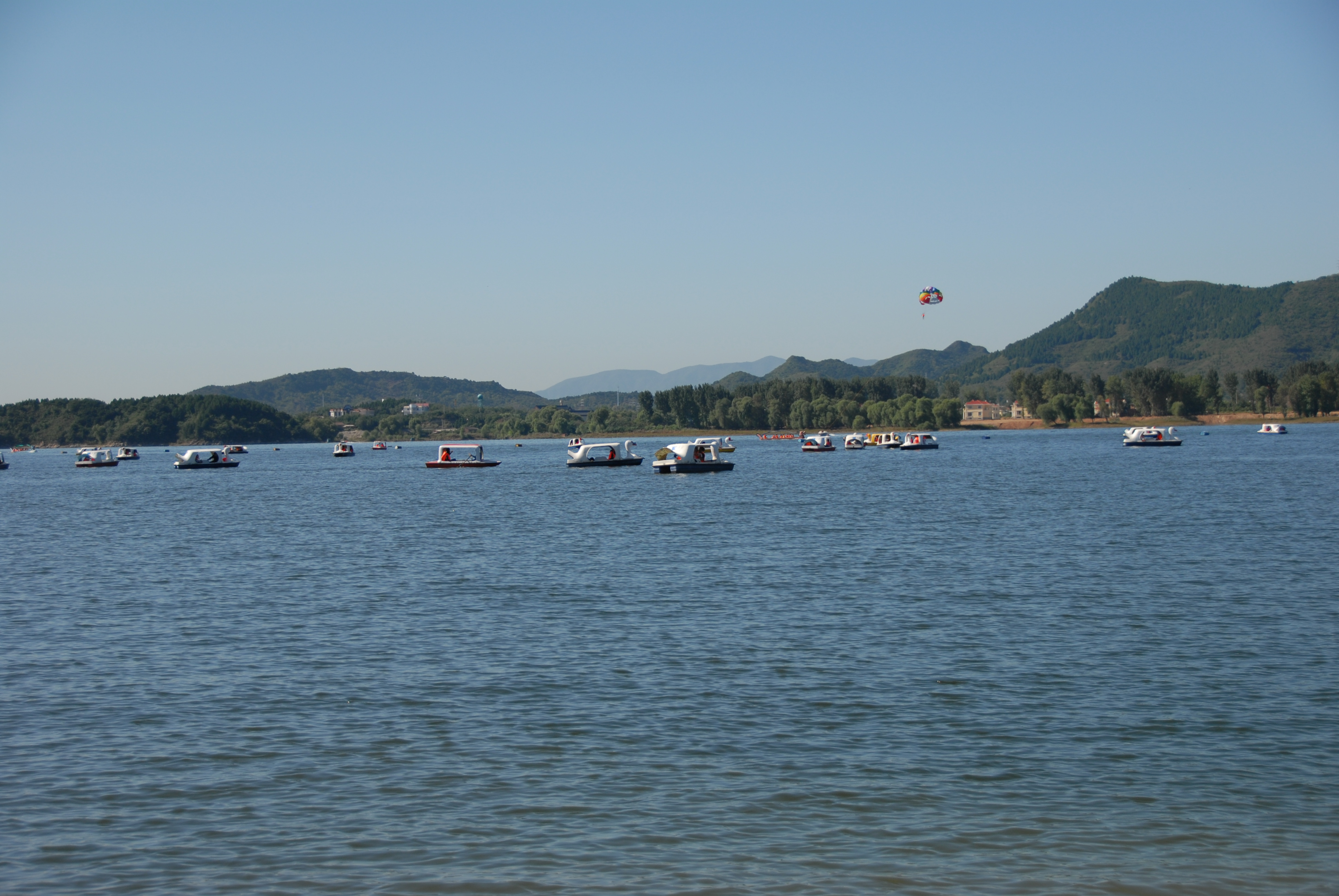 雁栖湖 Yanqi Lake 옌치호